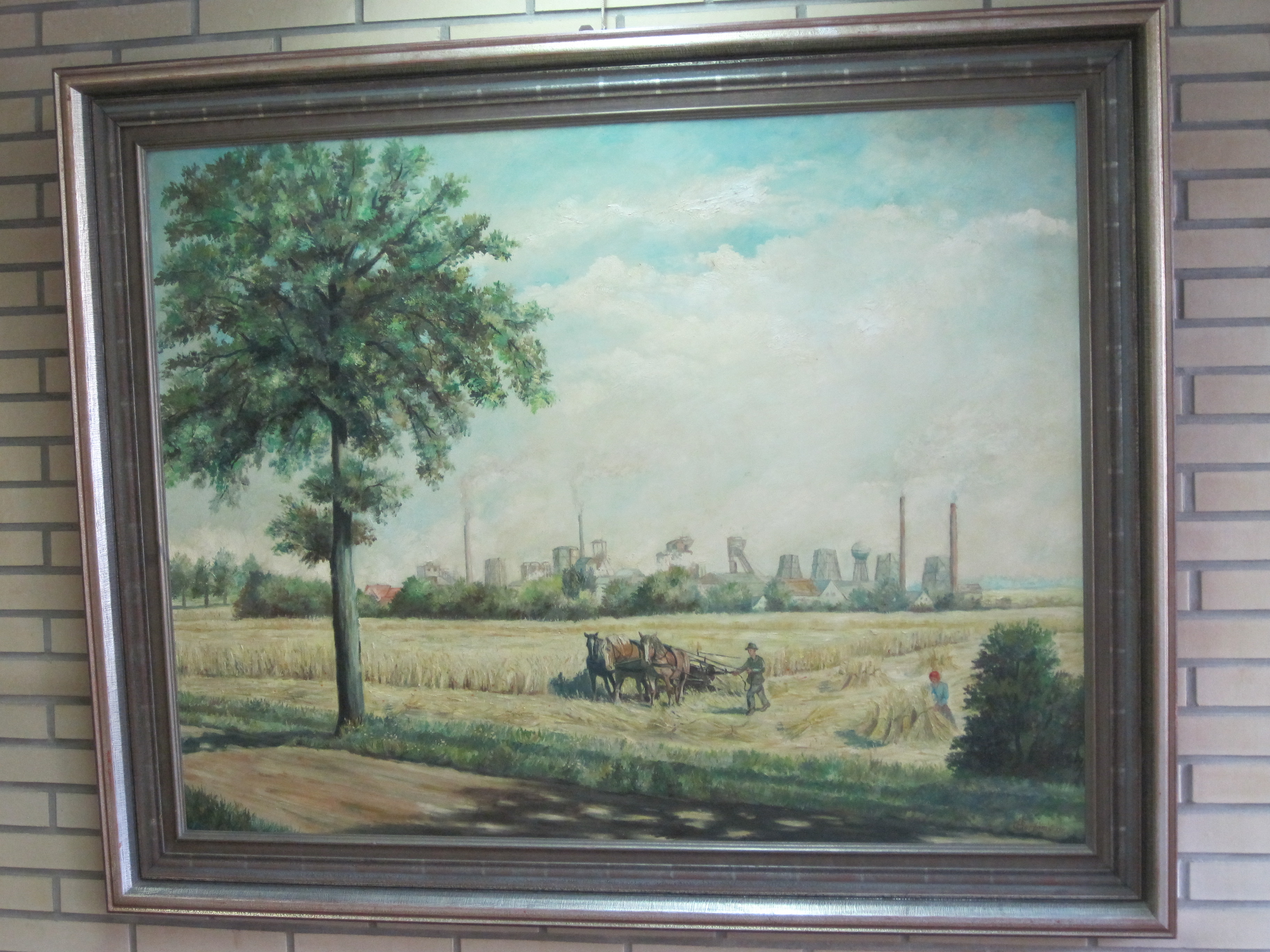 Das Foto zeigt ein Bild mit einer Darstellung des ländlichen wie des industriellen Bockum-Hövels, das im Rathaus Bockum-Hövel hängt.